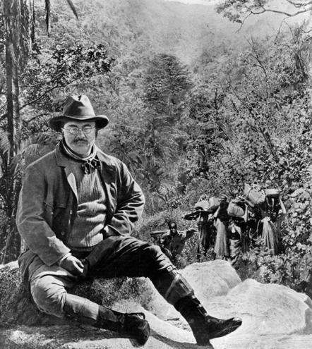 테오도르 루스벨트의 사냥